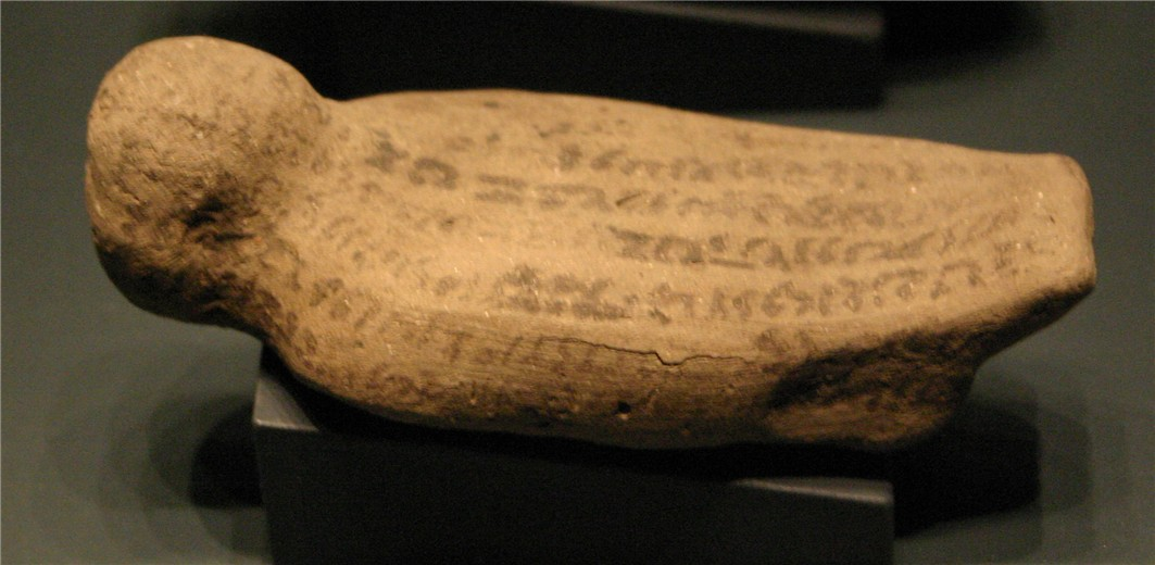 Execration figure, Brussels, Musées Royaux d'Art et d'Histoire E.7491